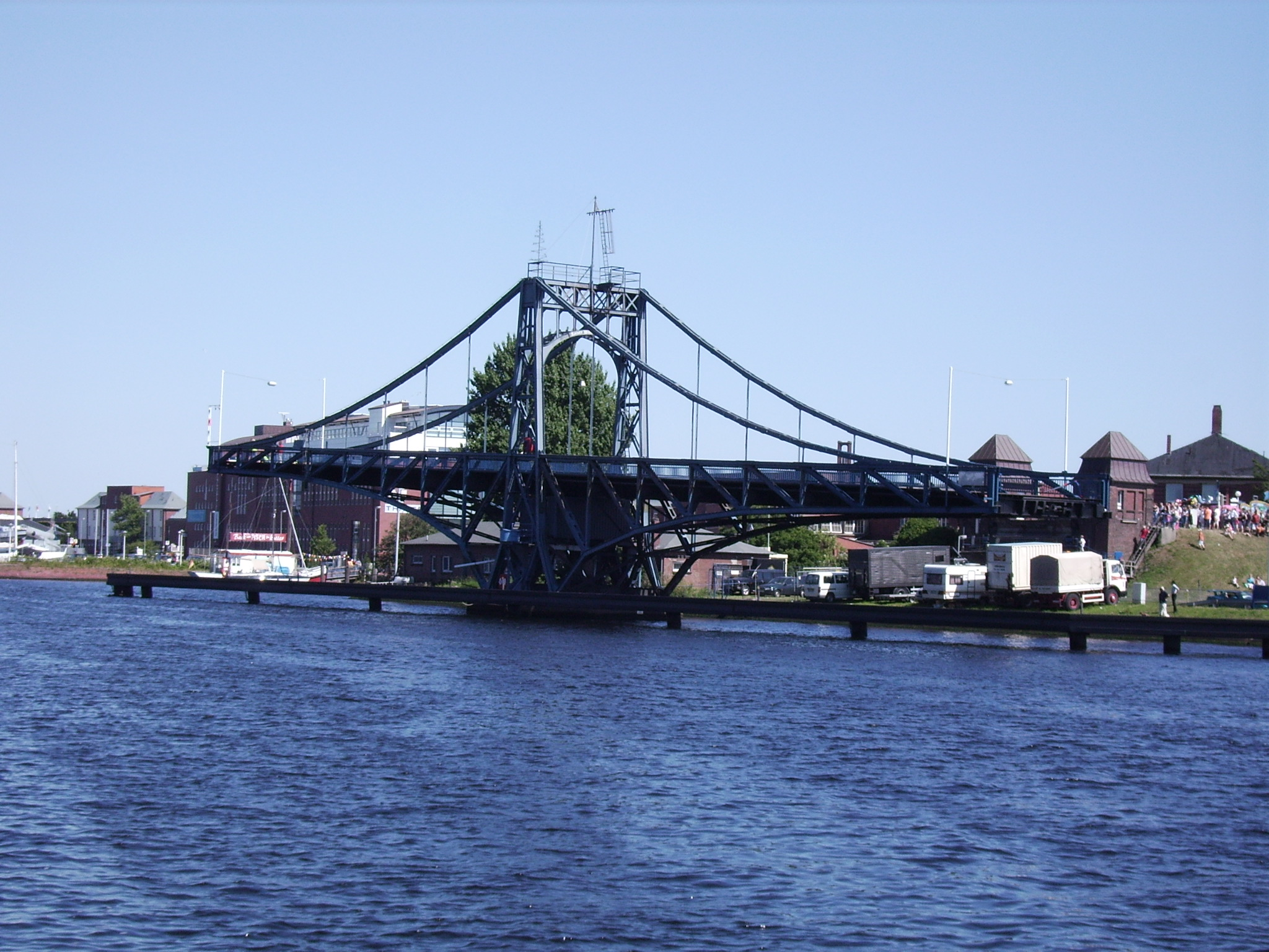 Kaiser-Wilhelm-Brücke Wilhelmshaven